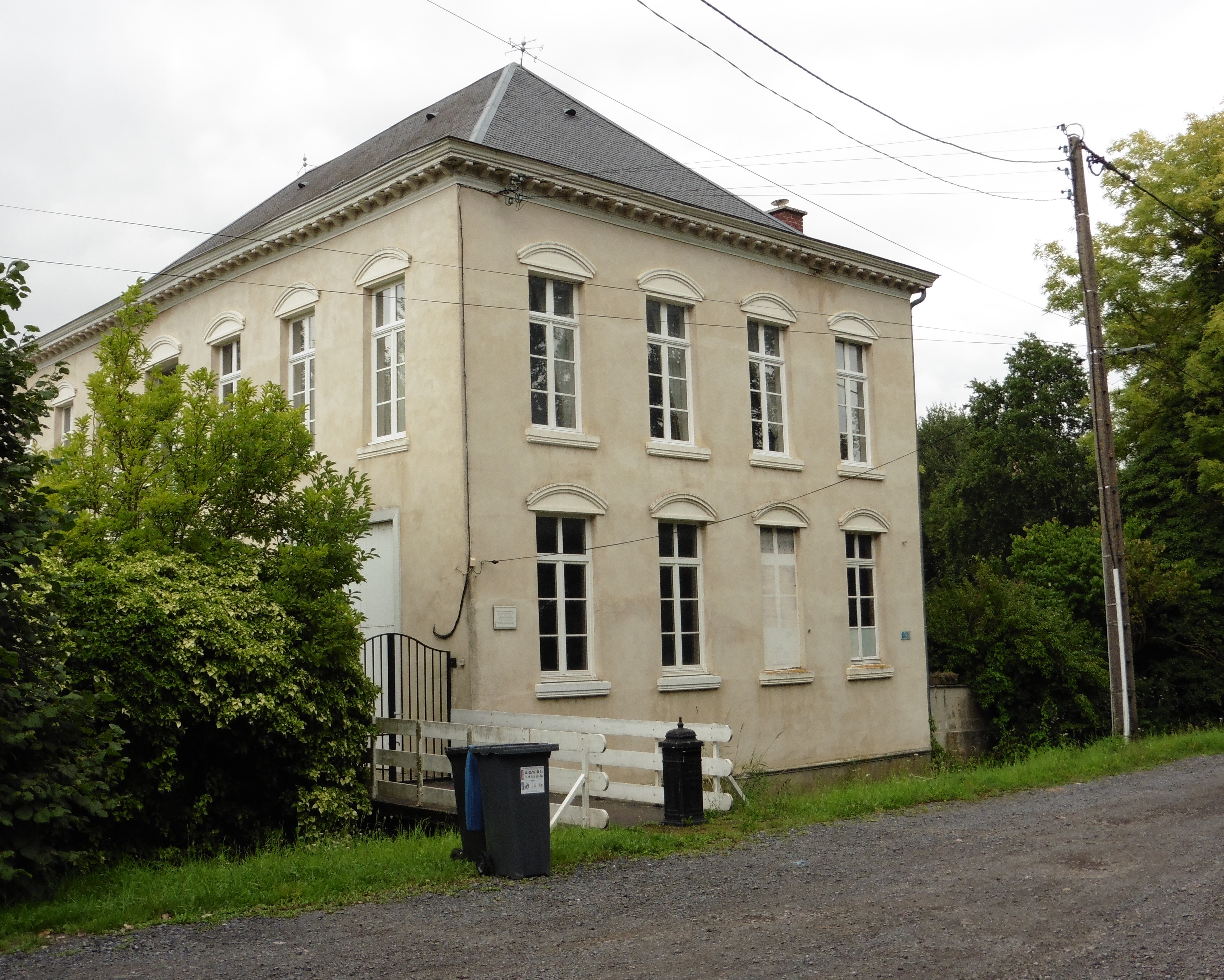 Maison du poète et député Antony_Thouret à Bouvignies (Nord) dans le Nord région Nord-Pas-de-Calais France.